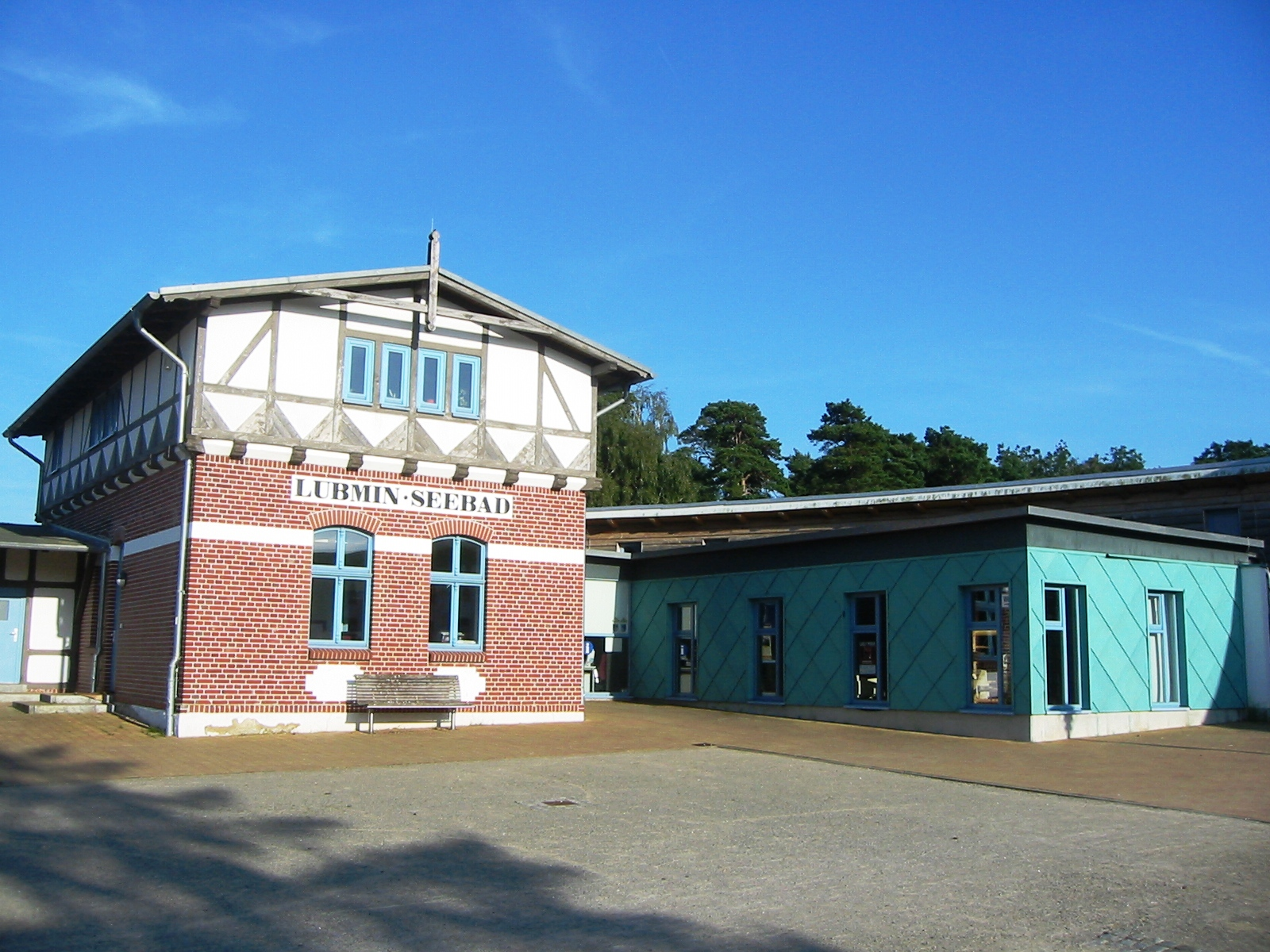 Kurgastzentrum und Bibliothek der Gemeinde Lubmin an der Wusterhusener Straße